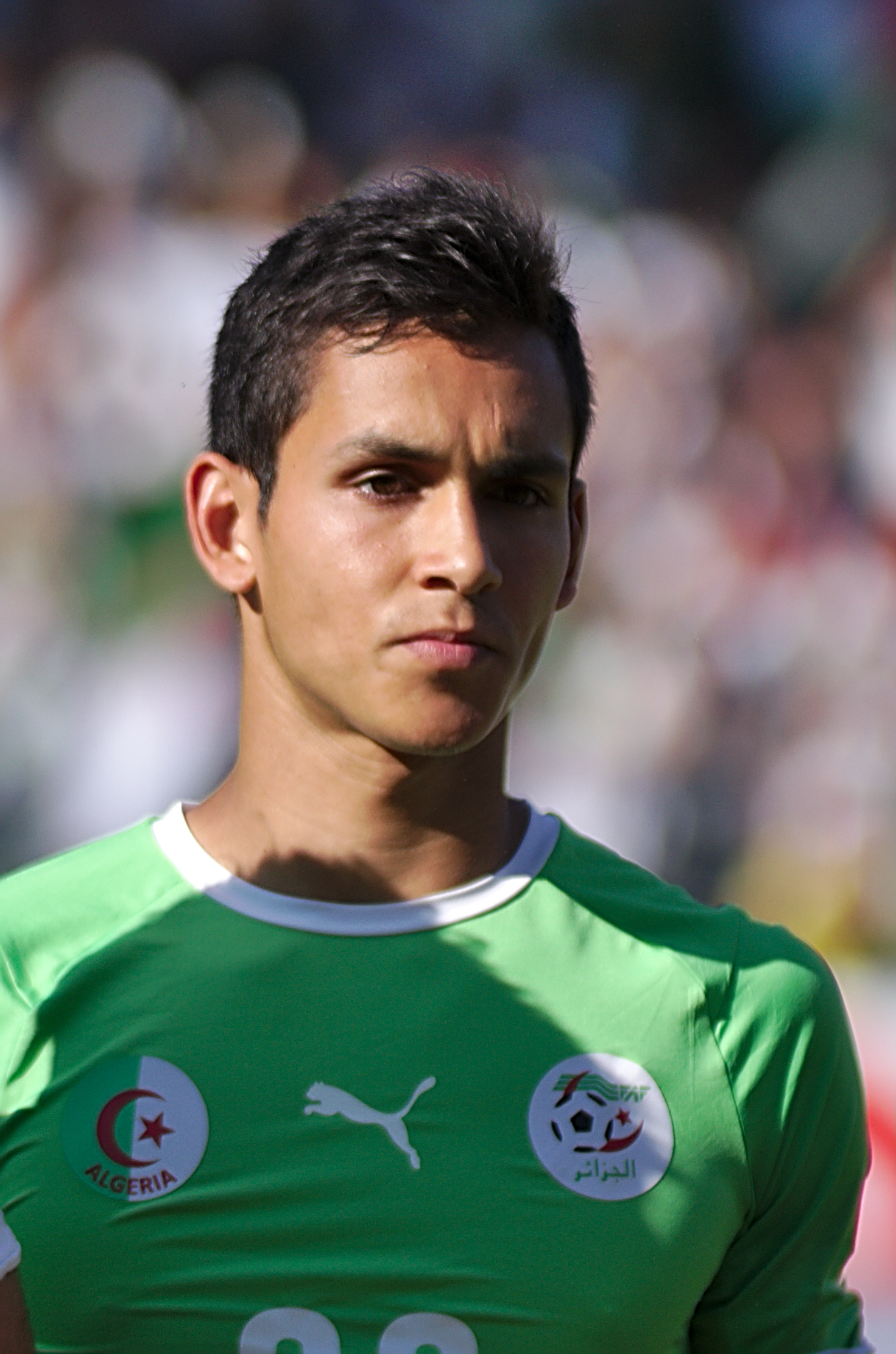 Algérie - Arménie - 20140531 - Aissa Mandi